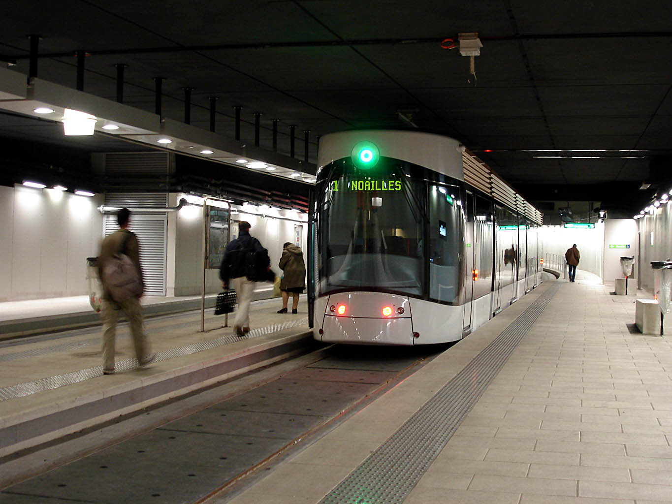 Station Noailles de la ligne 1 du tramway de Marseille, France.